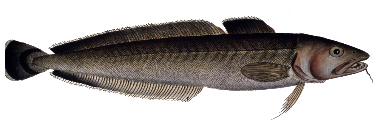 Molva molva